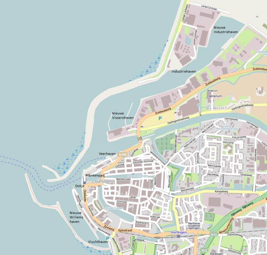 Haven van Harlingen